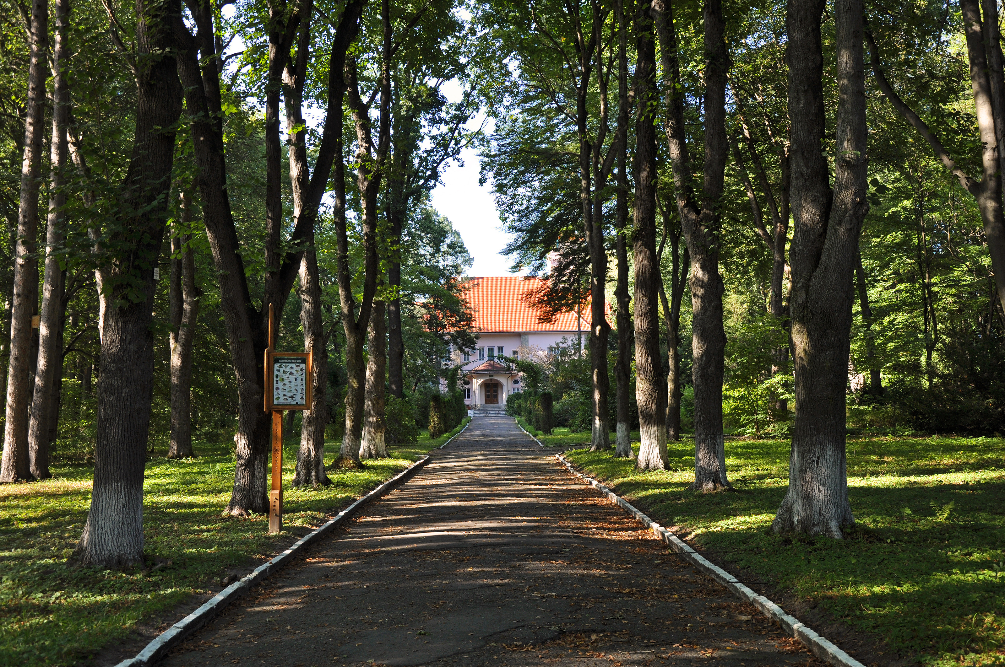 Сторожинецький, Сторожинецький район, м. Сторожинець